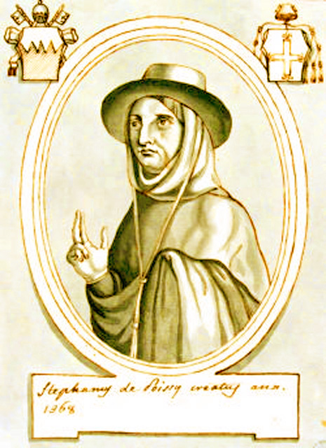 Cardinal Étienne de Poissy